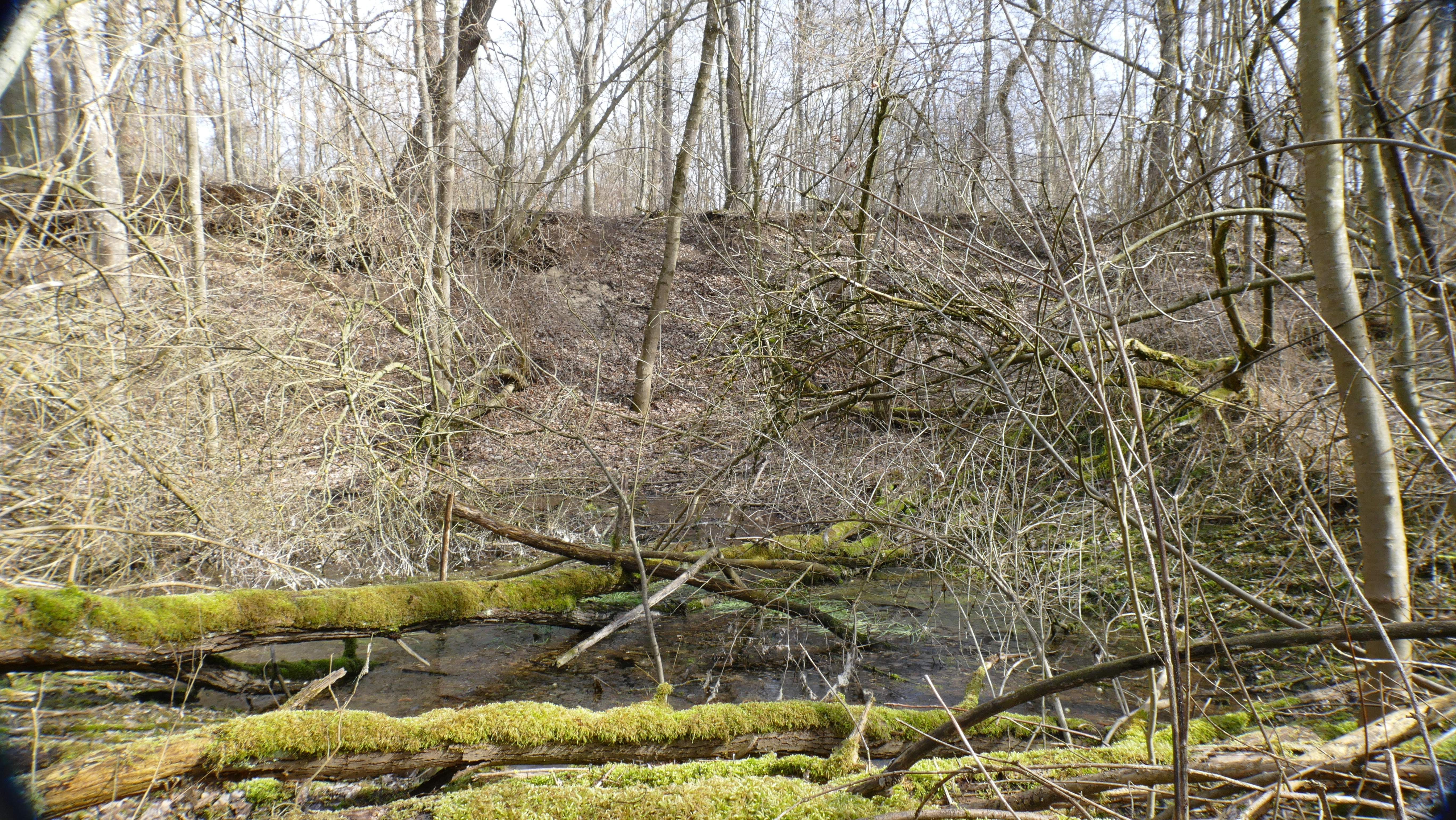 Bei Eichenried findet man in einem kleinen ehemaligen Abbau warmzeitliche Ablagerungen zwischen Hochterrassenschotter und jüngeren Deckenschottern mit Molluskenfauna und Resten einer Bodenbildung (braune Rendzina).Müllablagerungen beeinträchtigen das Bild. 177A001